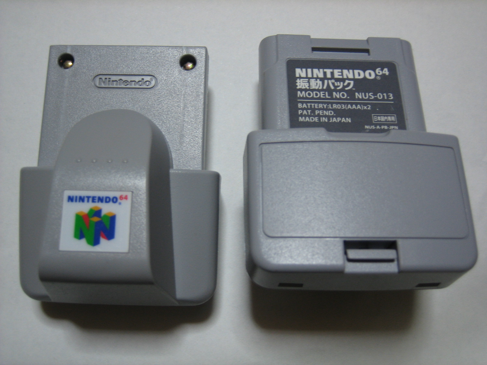 nintendo64_nus-013